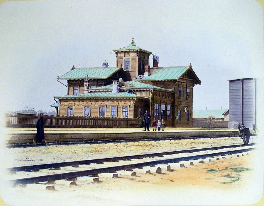 Беларуская (тарашкевіца): Рудня (Rudnia), вуліца Станцыйная (vulica Stancyjnaja). Чыгуначная станцыя